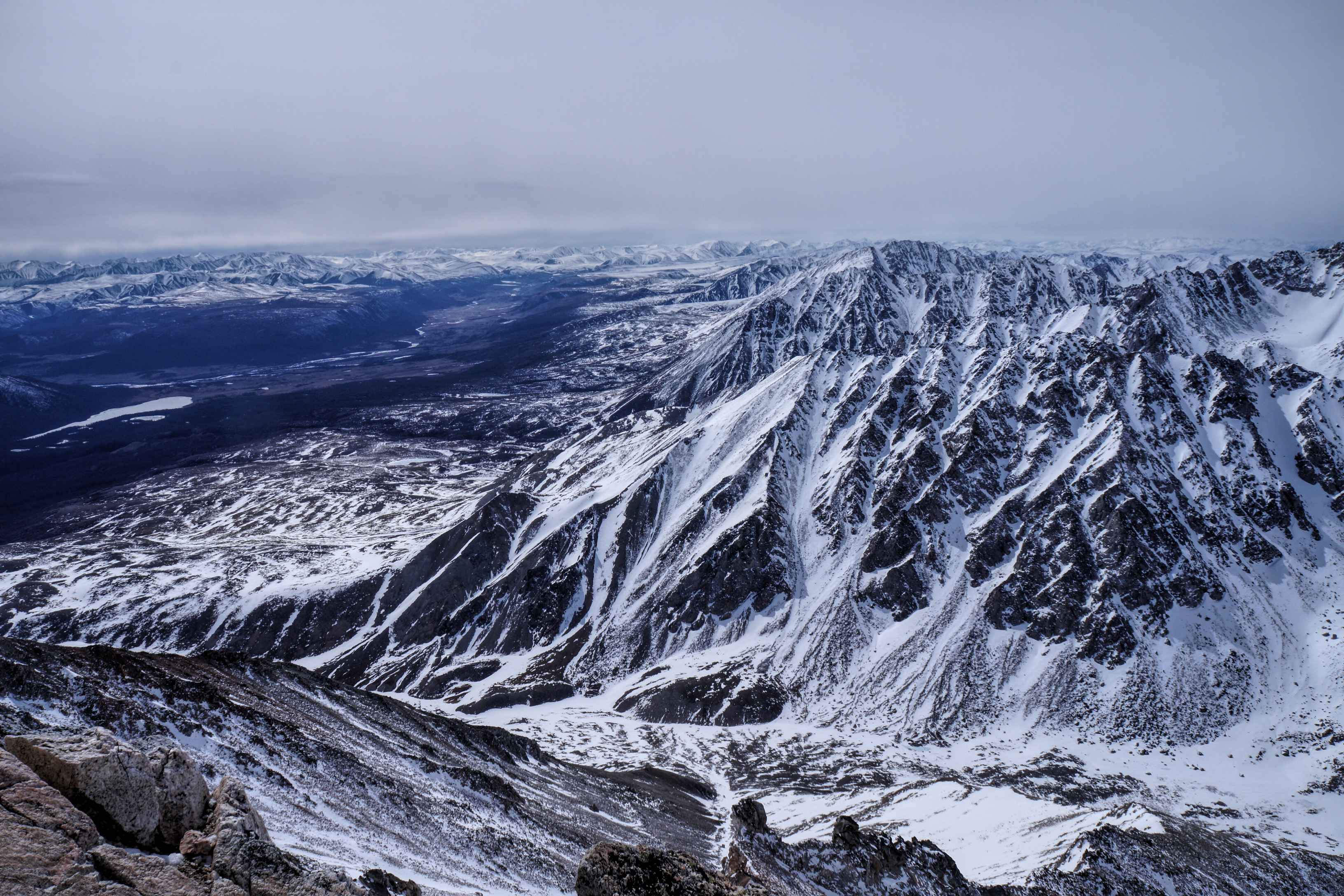 Ледники Мунку-Сардык: район, Бурятия This image is related to the protected area of Russia number 0310191